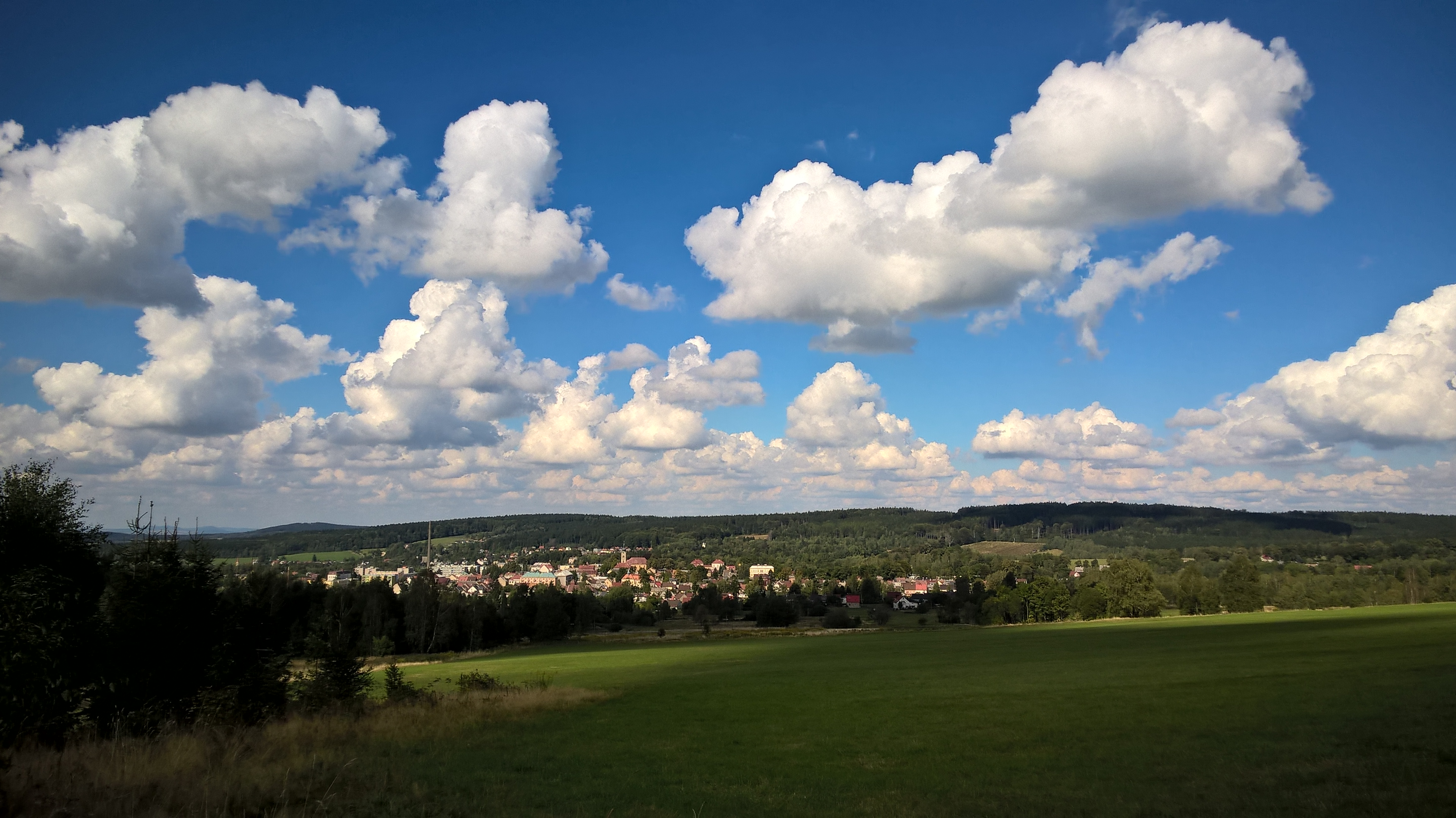 Nové Město pod Smrkem a Jindřichovický hřeben (vpravo Hřebenáč, vlevo vrch Nad nádražím) z úpatí Měděnce (777 m)